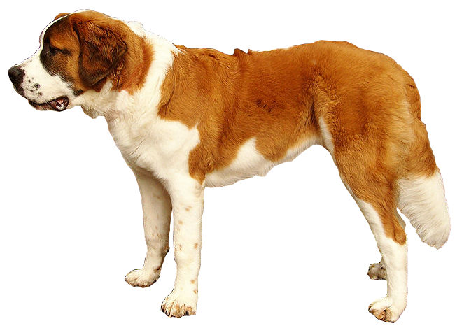 Saint-Bernard sur fond blanc